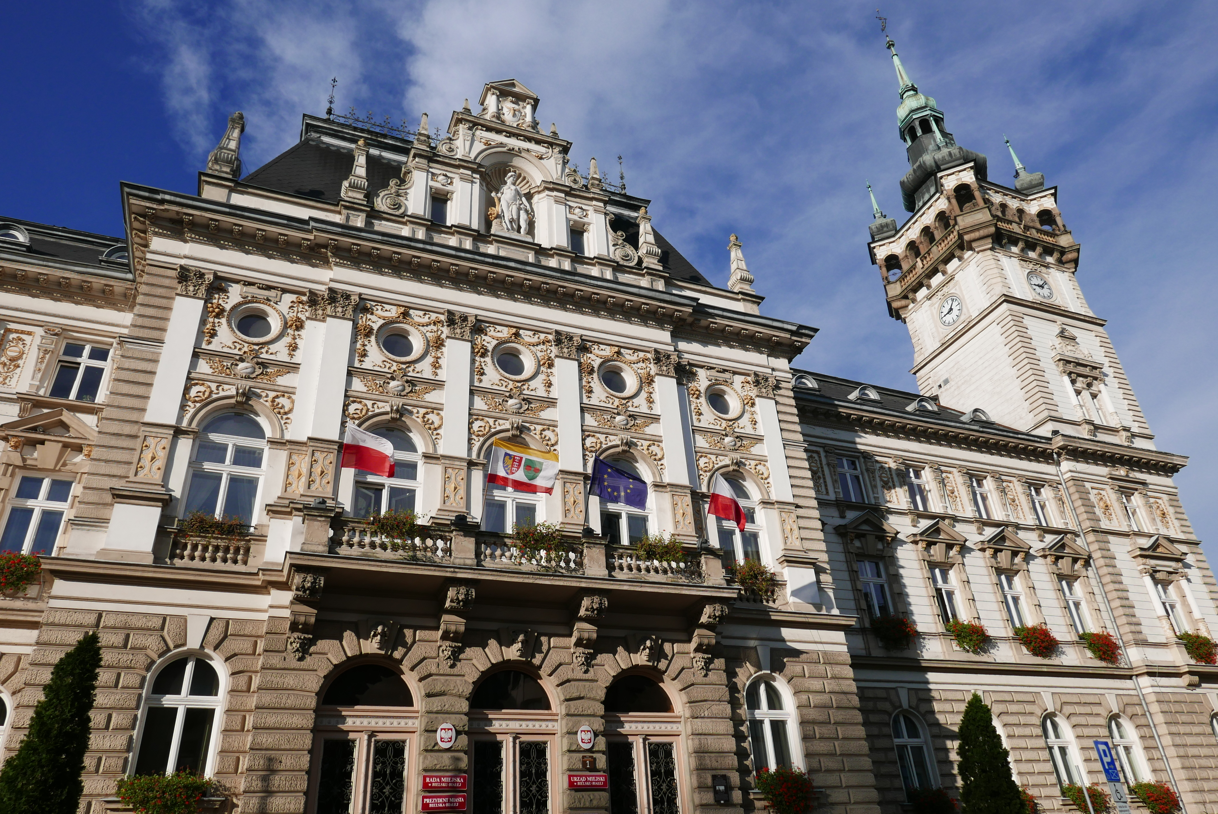 Fasada ratusza w Bielsku-Białej. Ratusz w Bielsku-Białej